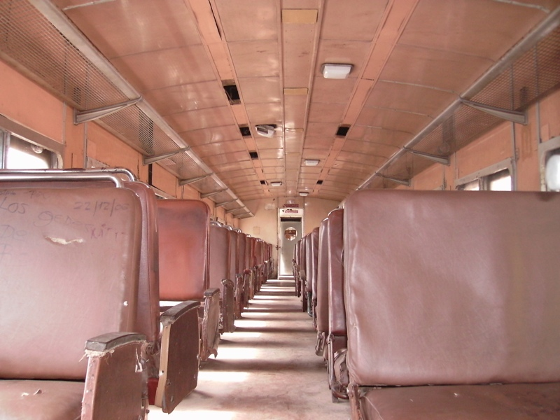 Interior origianal de coche clase turista Materfer.